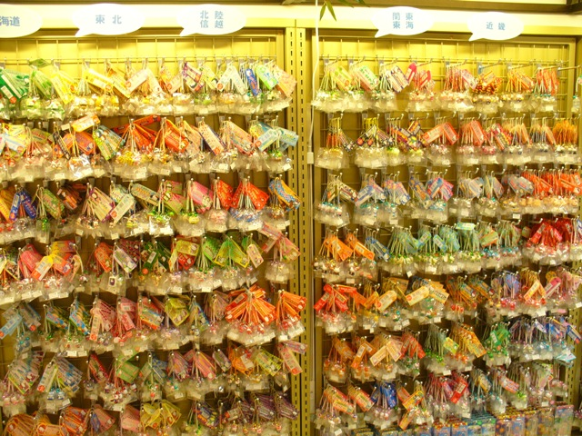 ご当地キティ全国域販売コーナー